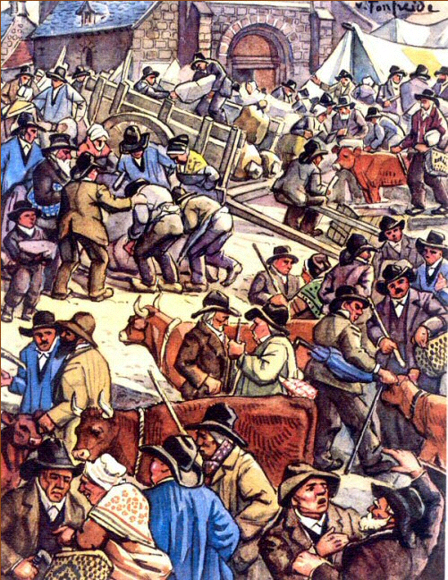 Gravure sur bois, illustration de Auvergne et Auvergnat de Maurice Prax. Victor Fonfreide.